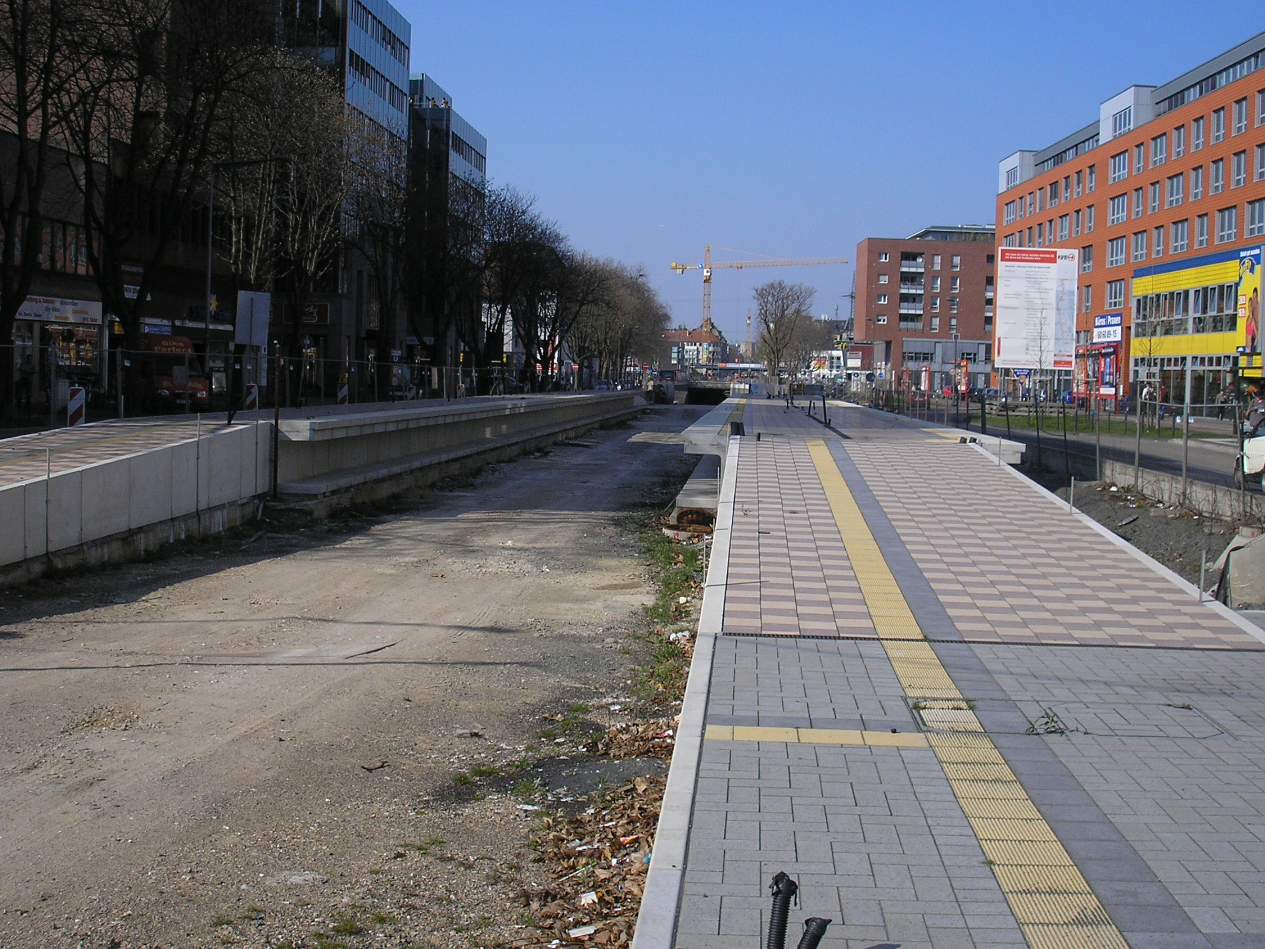 Nord-Süd Stadtbahn, Haltestelle Marktstrasse. Die Haltestelle Marktstrasse wird die erste oberirdische Haltestelle am Südende des Tunnels.